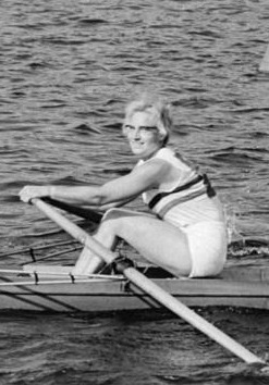 Ingrid Scholz